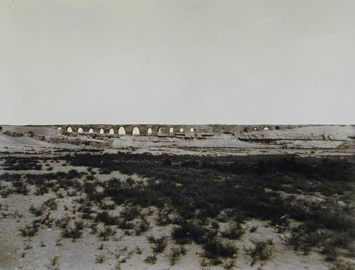 Qanatir ibn Tulun, Cairo, Egypt (Ibn Tulun Aqueduct, Aqueduct of Basatin)